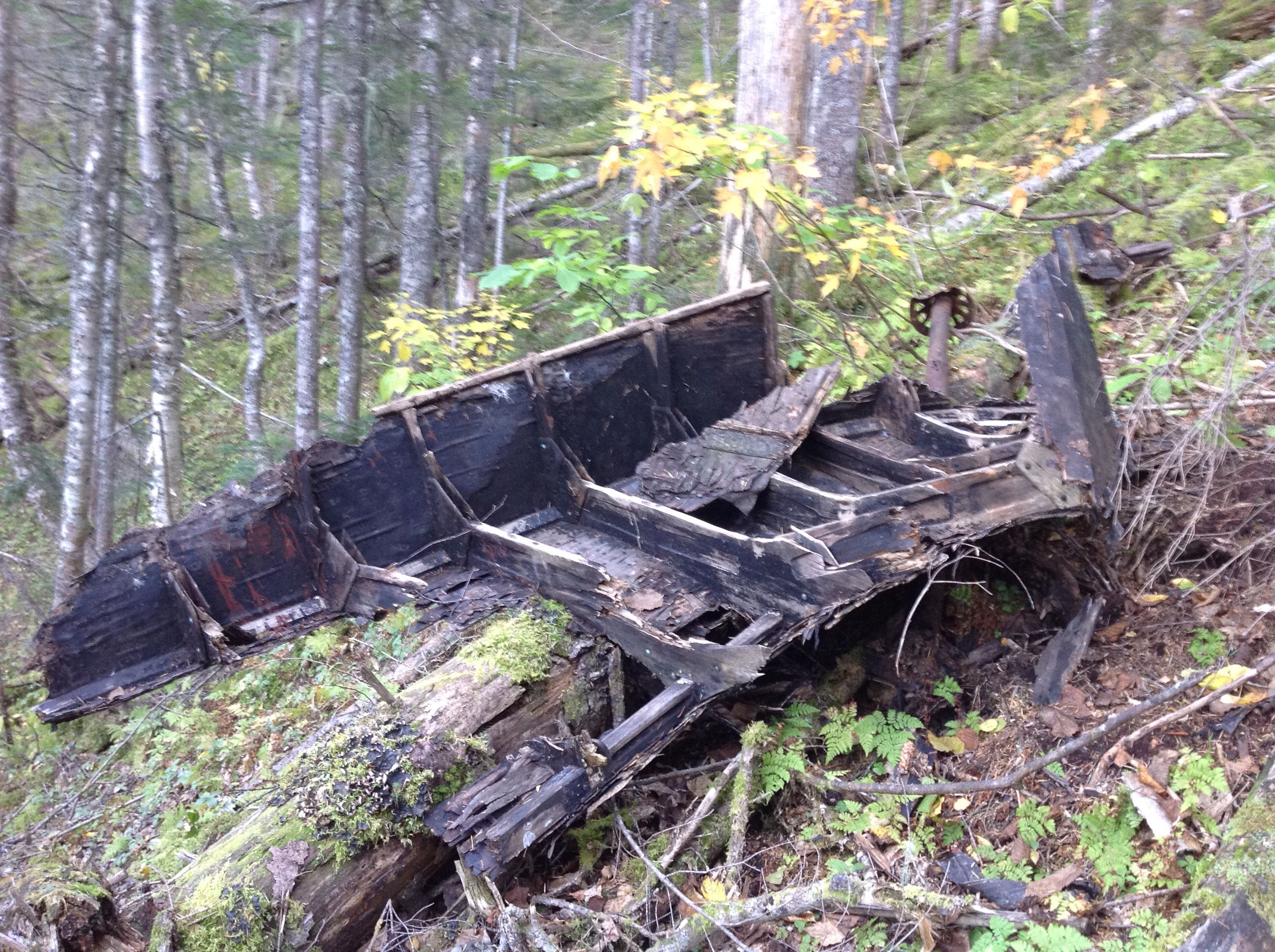 Части самолета